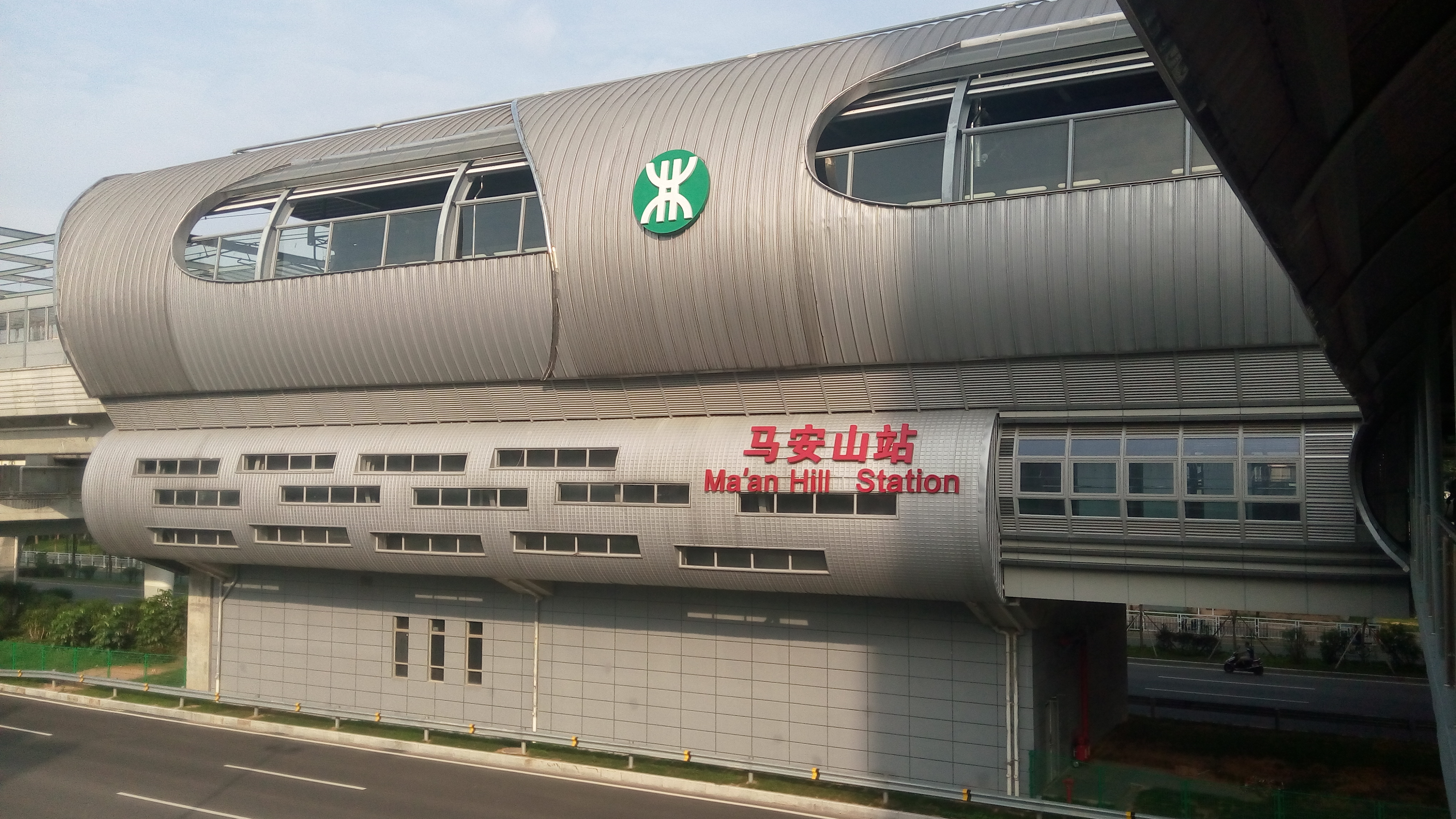 深圳地铁11号线马安山站